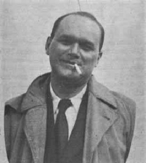 Francesco Lanza